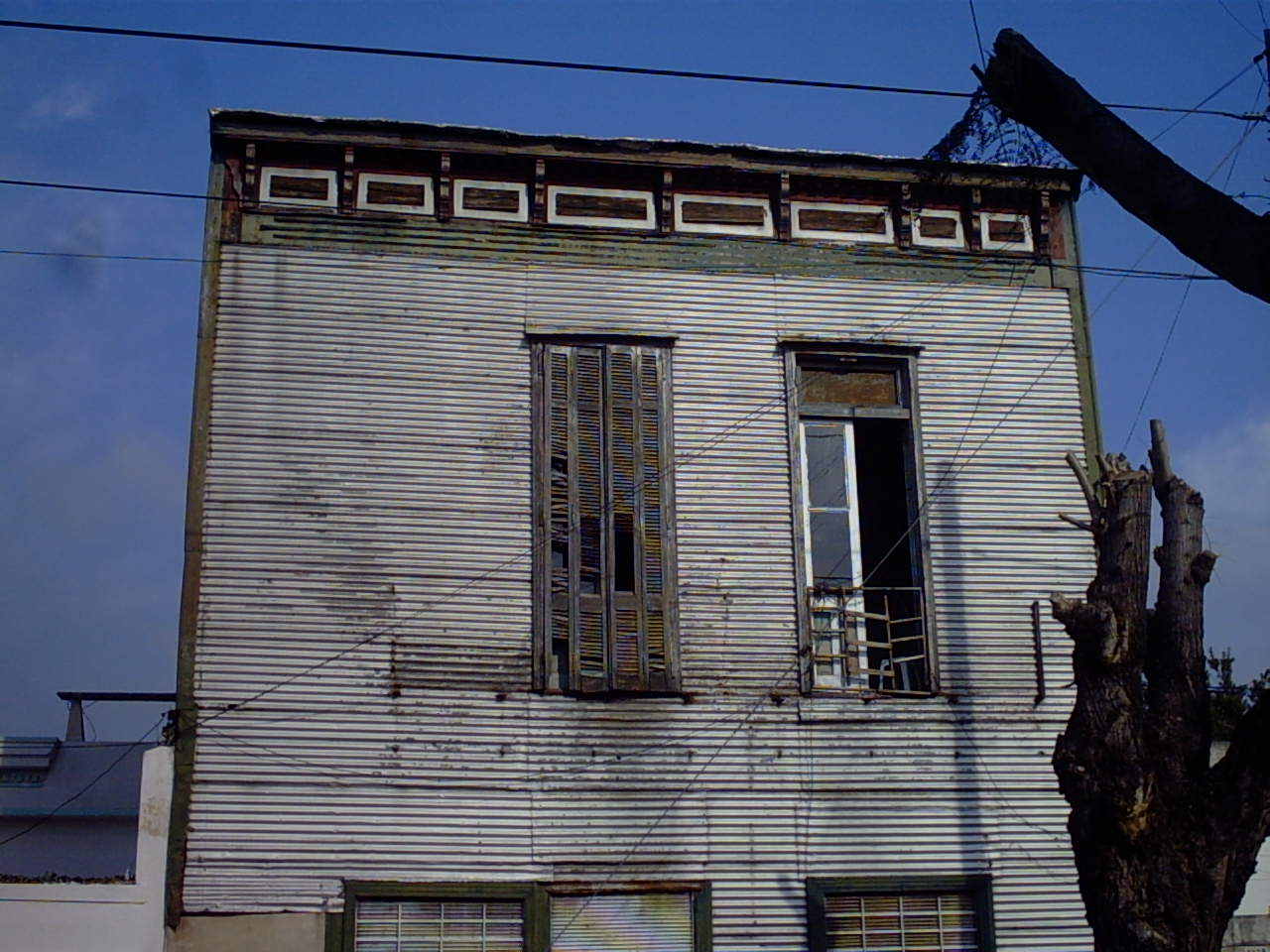 Típica construcción de una casa de Dok Sud, una de las primeras de la zona. Está construida en chapa y madera.